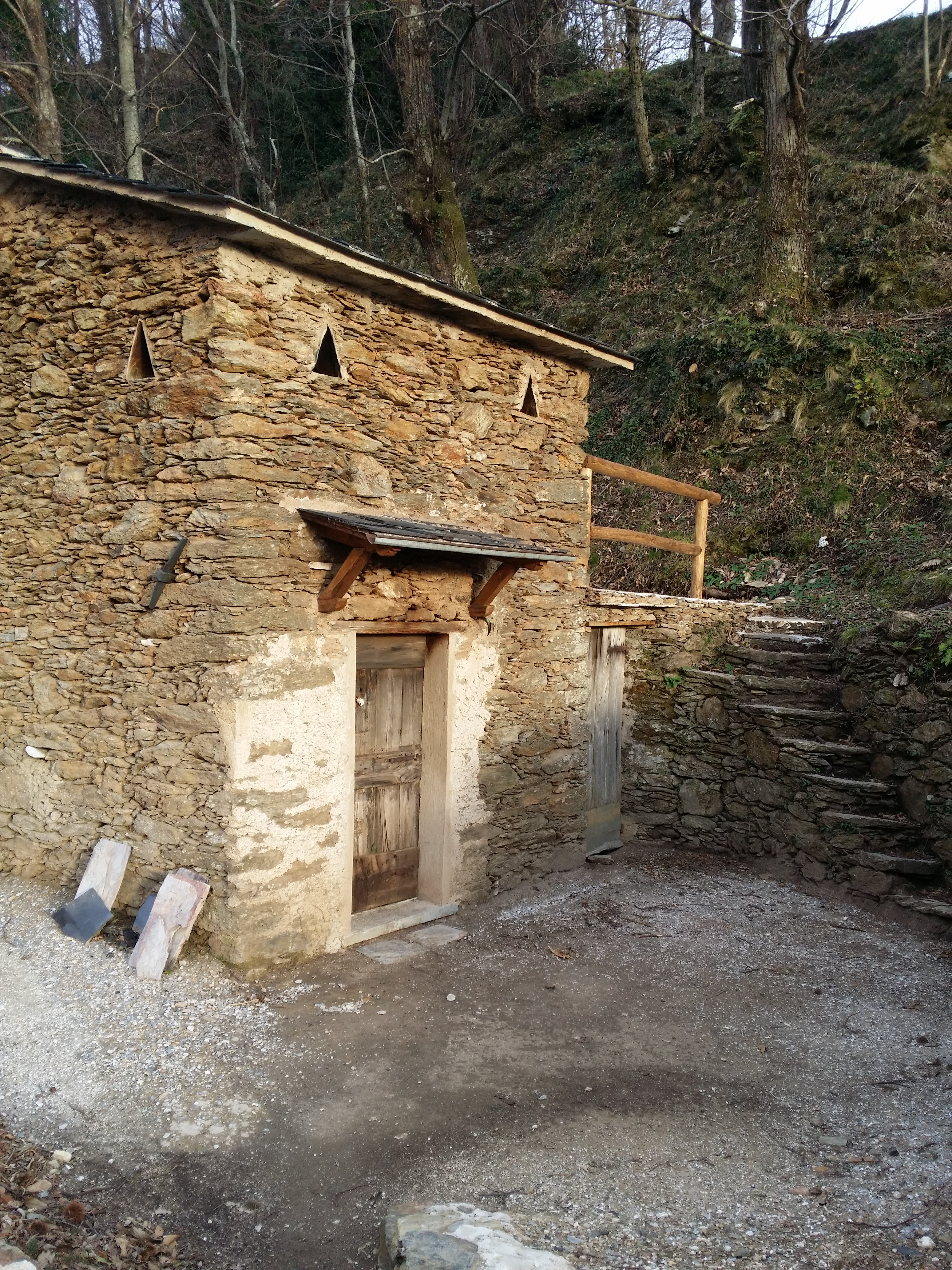 Metato di Retignano ricostruito di recente